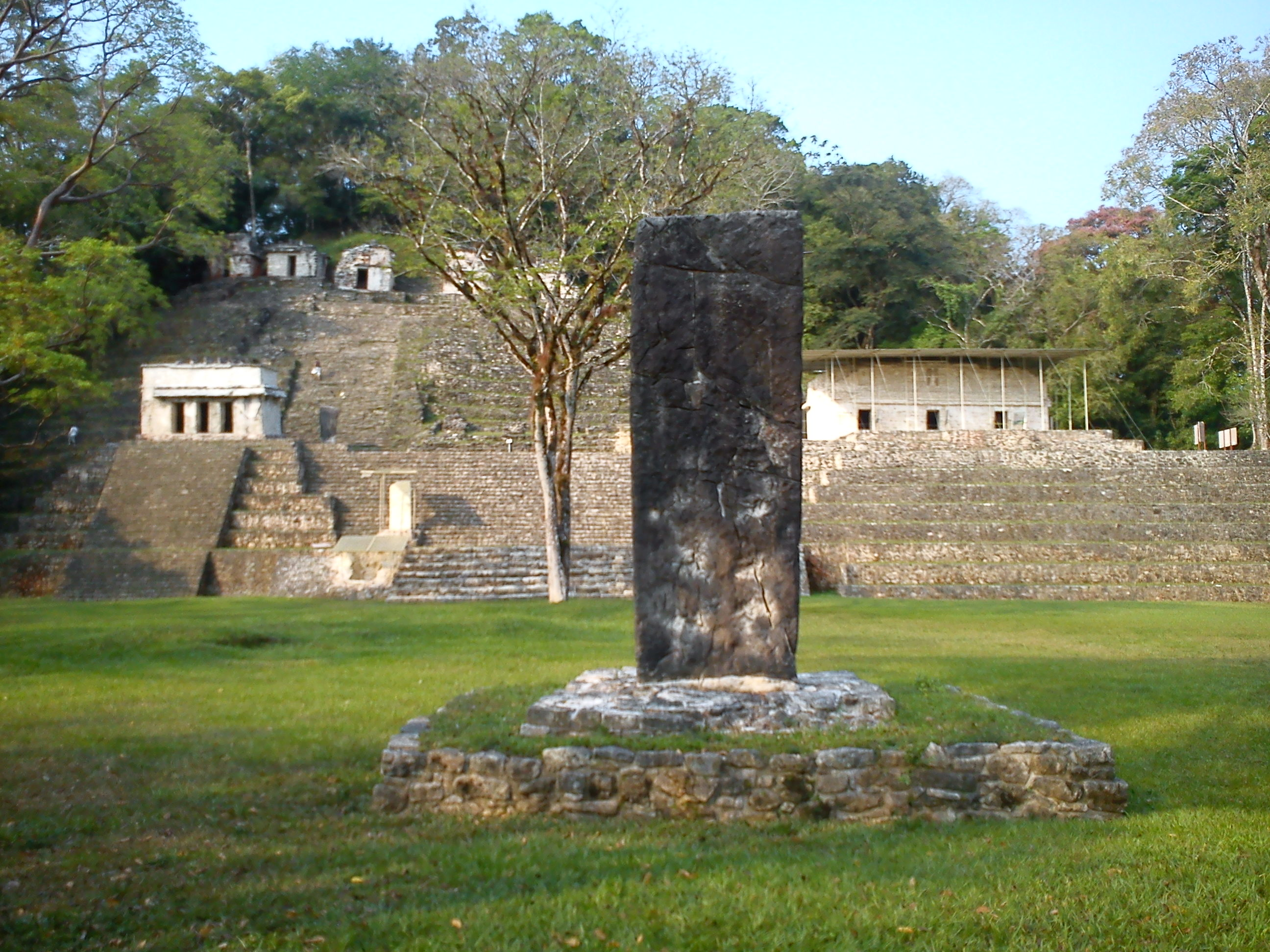 Estela frente al edificio 17 de la Gran Plaza de Bonampak